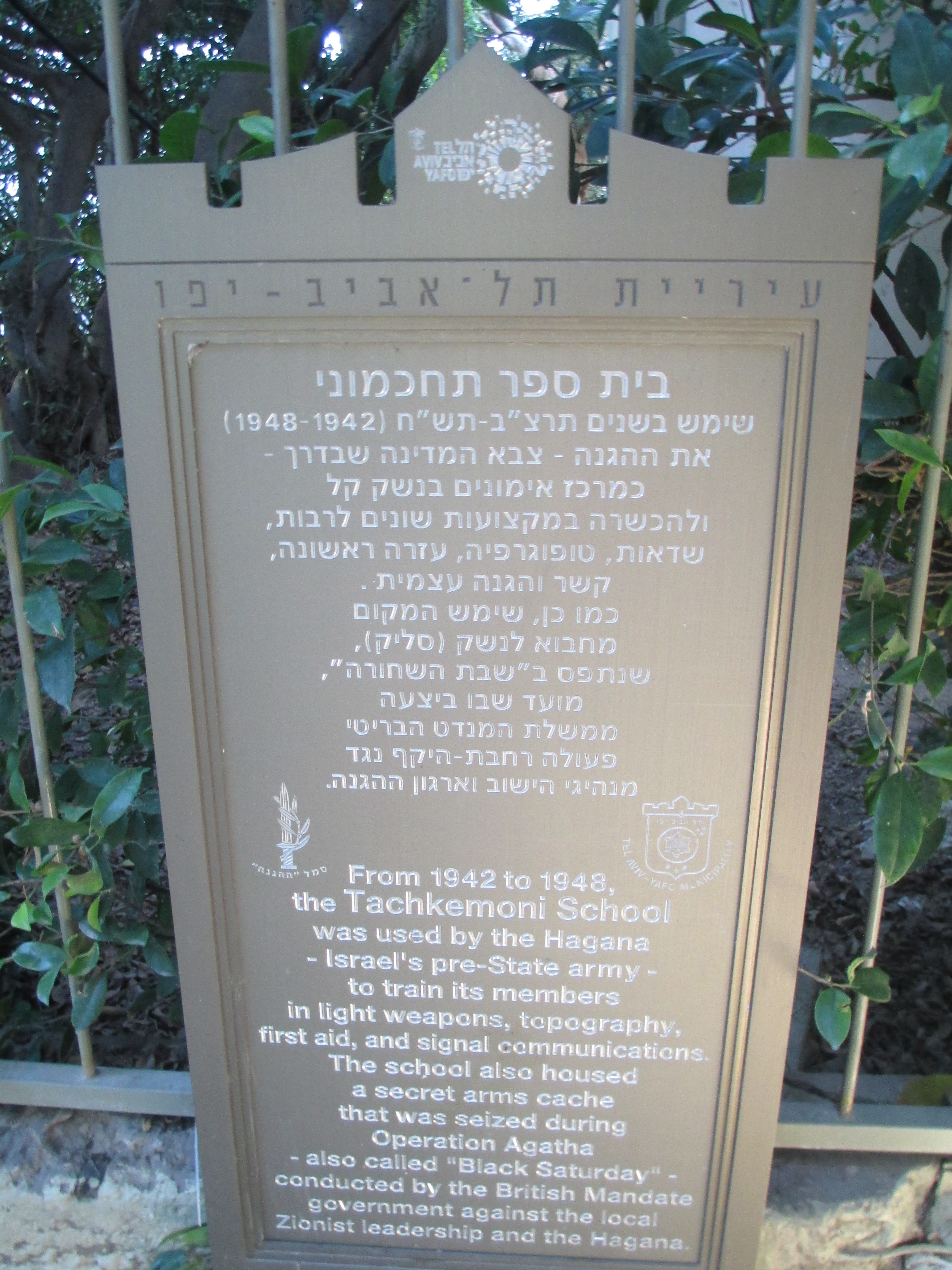 לוחית זיכרון של ההגנה בבית הספר תחכמוני ברחוב לילנבלום 7 בתל אביב